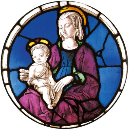 Giacomo e Domenico Cabrini su cartone di Francesco del Cossa Madonna col Bambino, Vetrata, diametro cm 54,5 Parigi, Institut de France, Musée Jacquemart-André